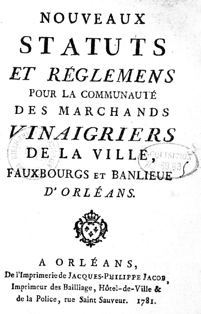 Couverture de la monographie " Nouveaux statuts et règlemens pour la Communauté des Marchands Vinaigriers de la ville, fauxbourgs et banlieue d'Orléans ". Editeur imp. de J.-P. Jacob (Orléans)